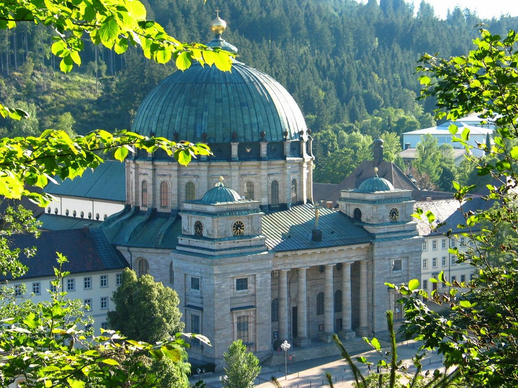 Dom von St. Blasien